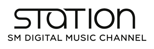 Logo del proyecto de S.M. Entertainment.